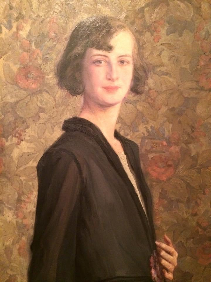 Retrato de la artista colombiana Carolina Cárdenas por F.A. Cano